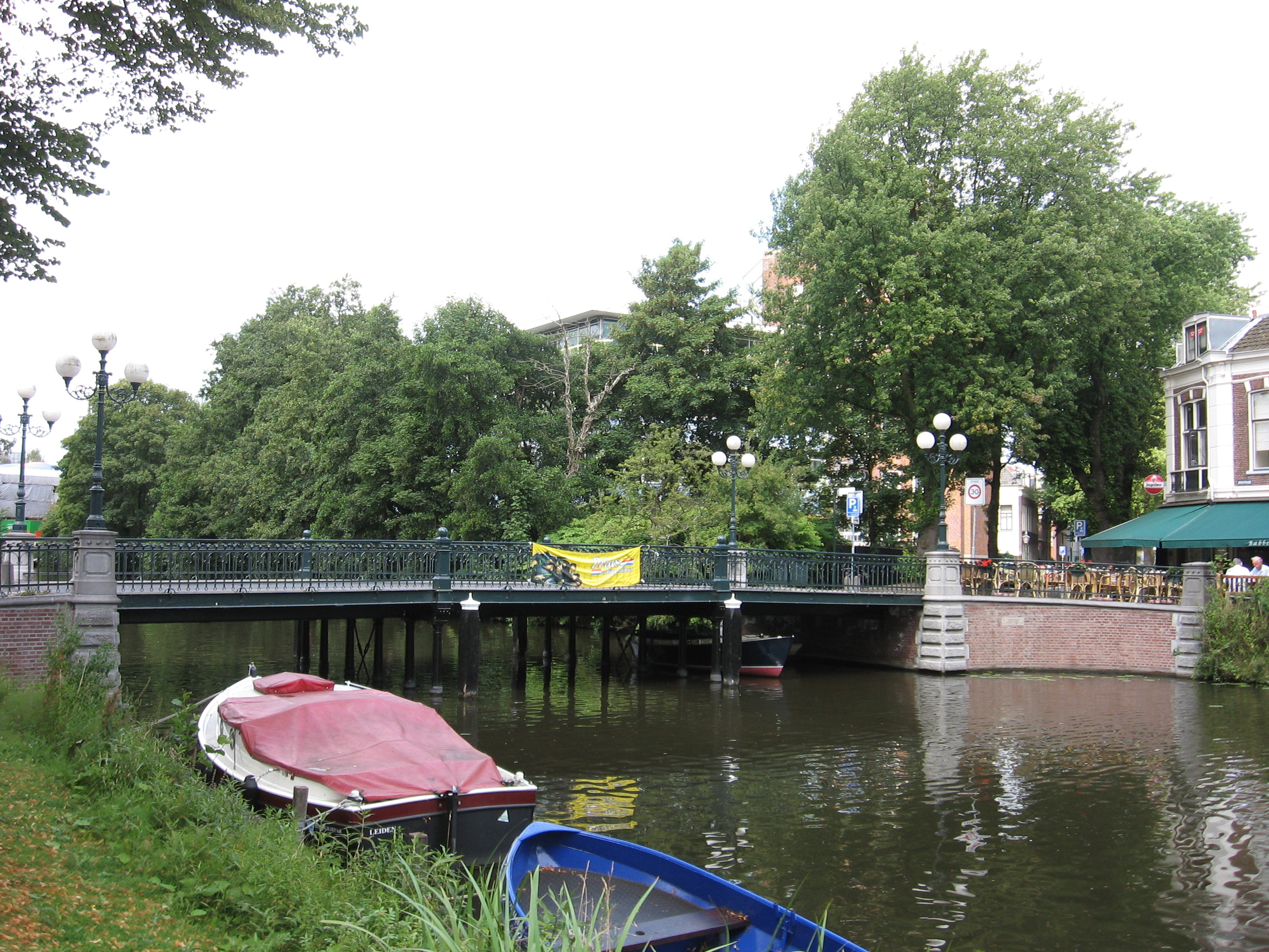 Vreewijkbrug detail Leiden.jpg